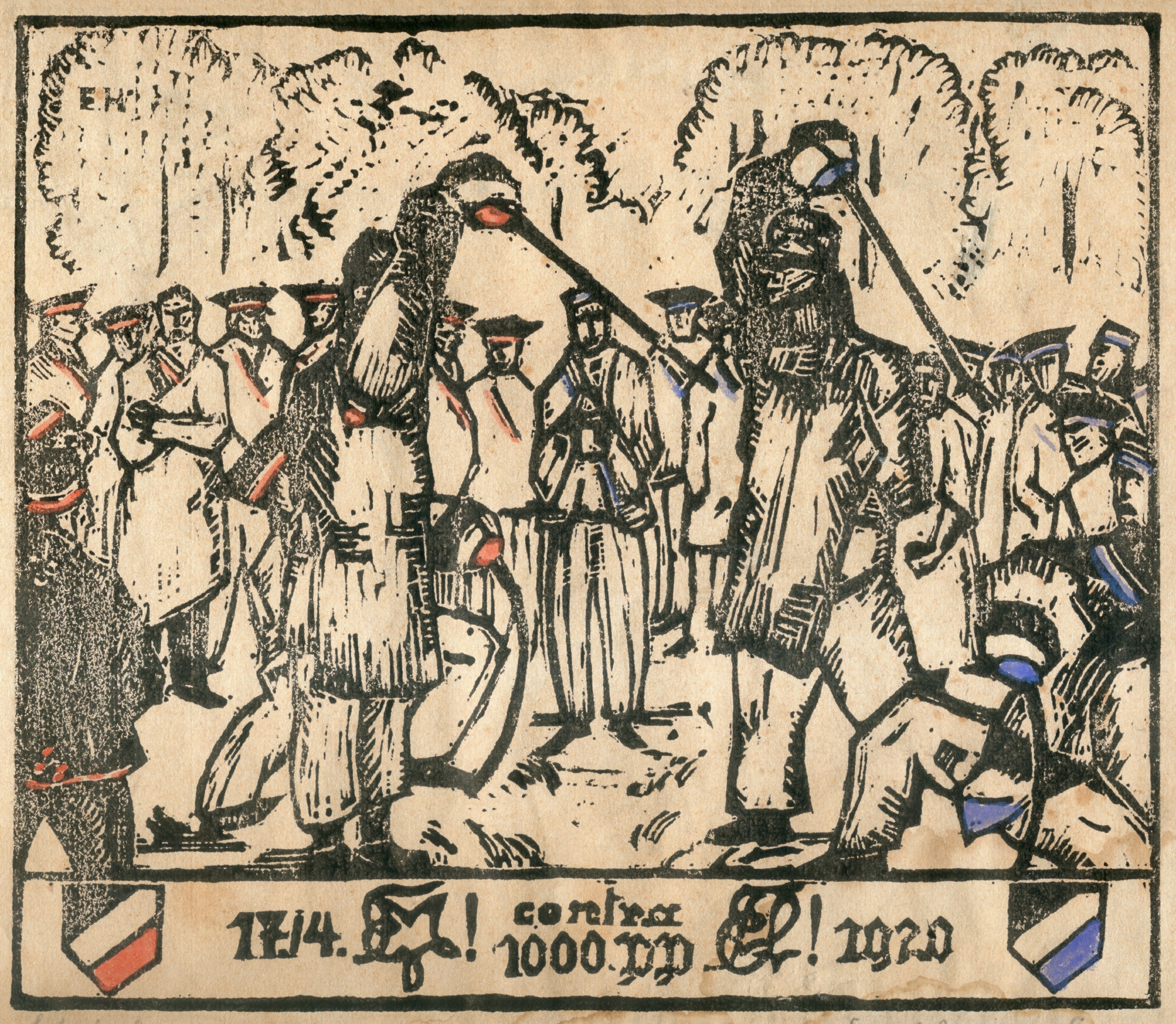 Holzschnitt zum 1000. Glied einer PP-Suite zwischen den Corps Suevia München und Makaria München